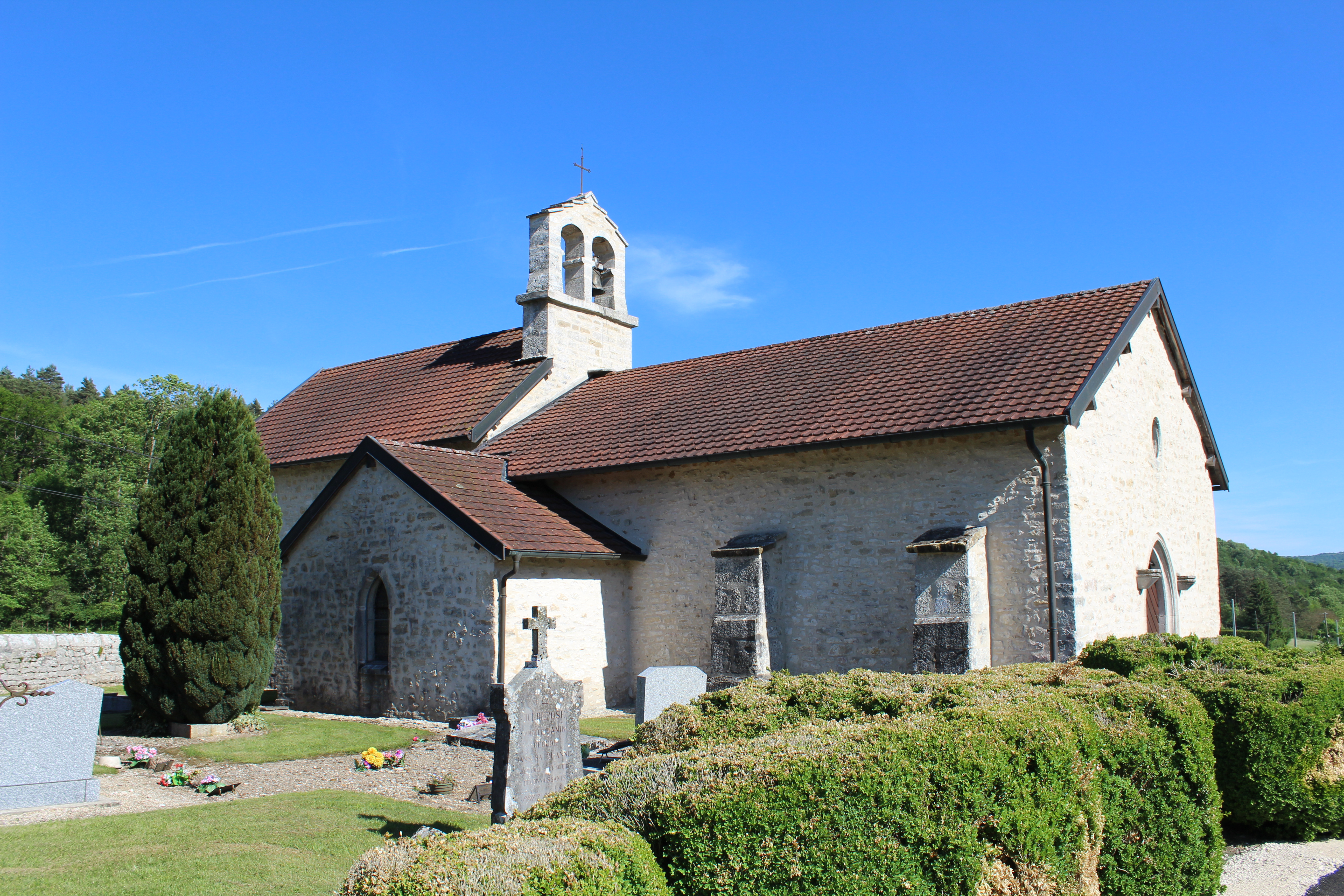 Église Sainte-Madeleine de Pouillat.